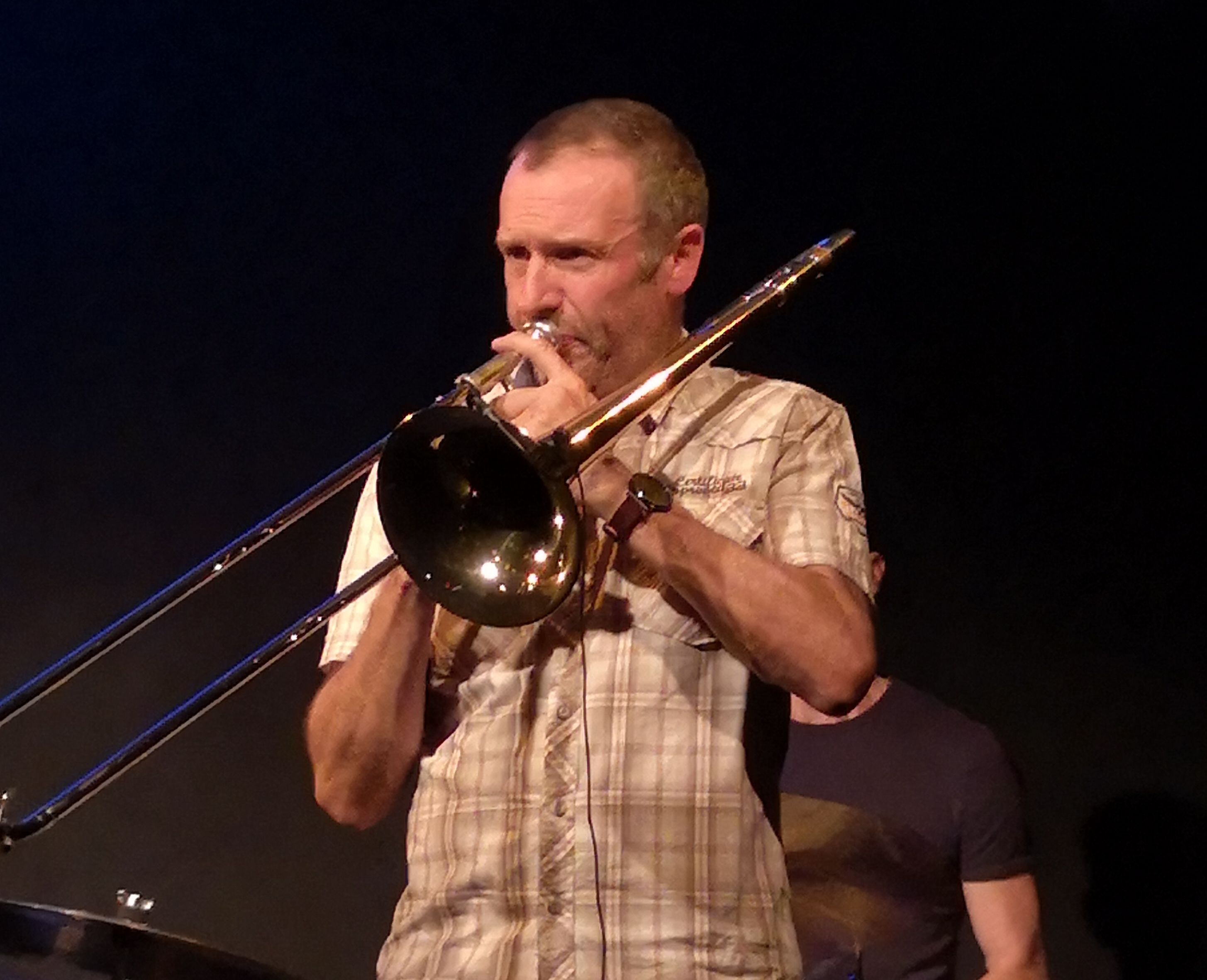 Phil Abraham en concert. L'An Vert, Liège 13/10/2018